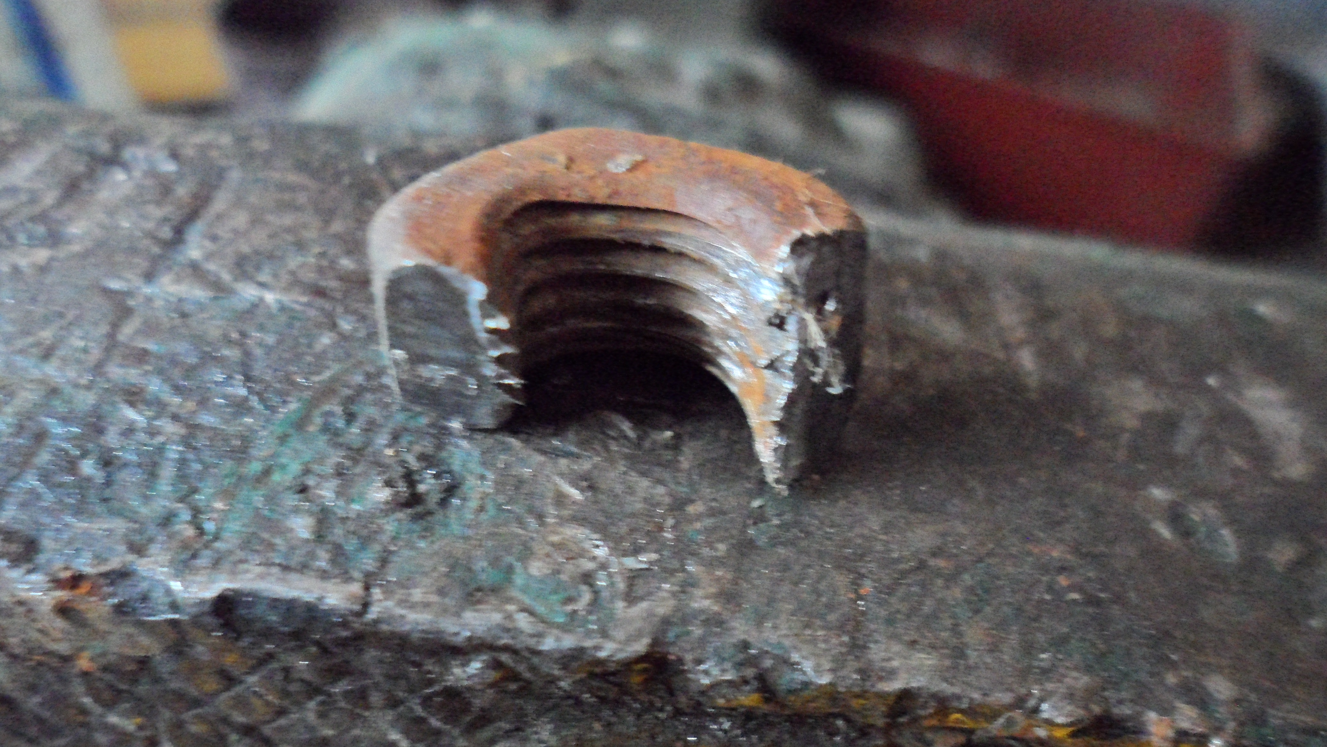 Ergebnis vom Einsatz eines Mutternsprengers